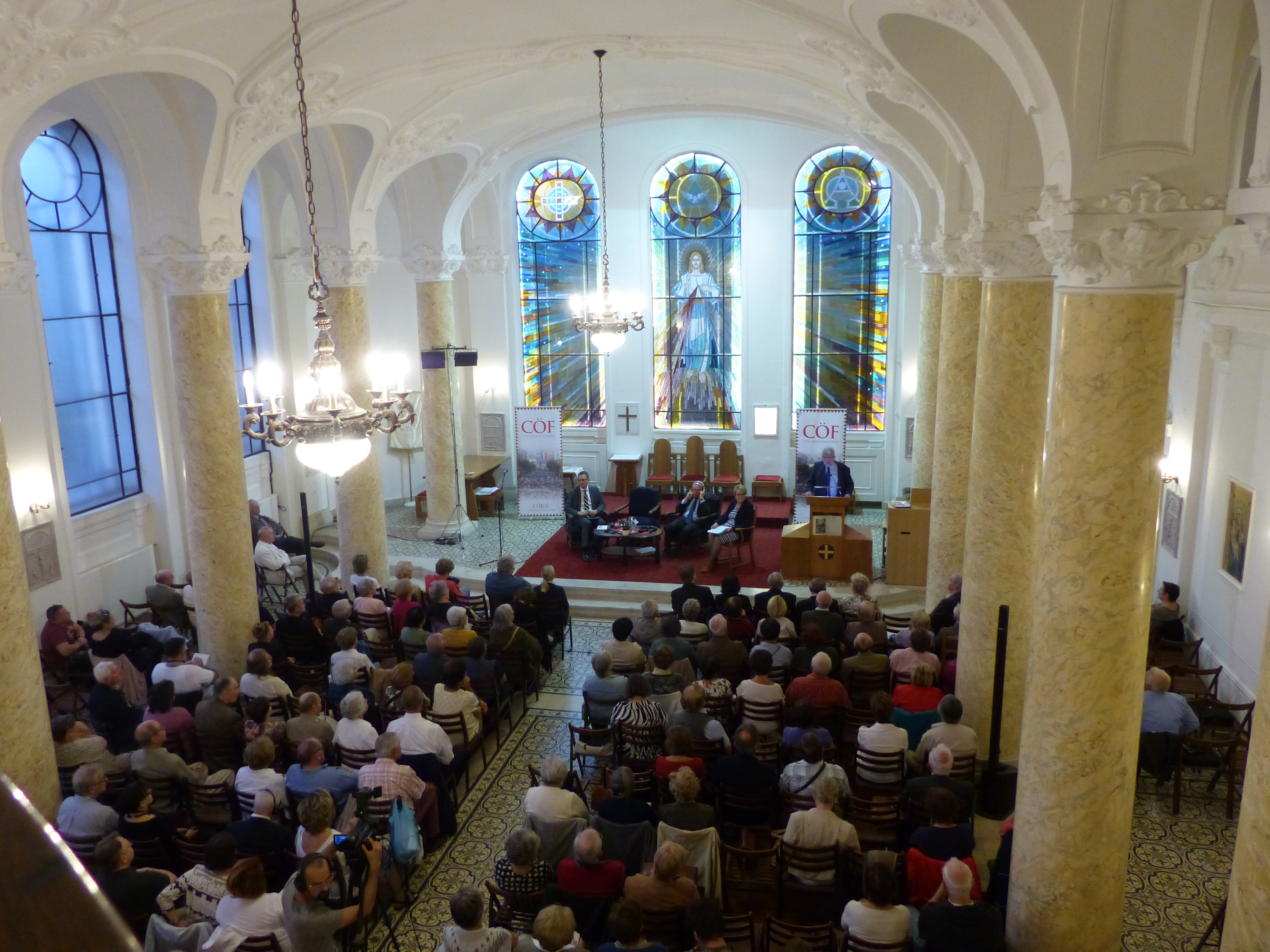 Csizmadia László. A felvétel 2016. szeptember 29-én készült a Szent Margit Gimnázium. Kápolnájában, Budapesten. Közös uniós jövönk a bajorokkal címmel rendezett civilisztikai konferenciát a Civil Összefogás Fórum. Köszöntőt mondott Csizmadia László (Civil Összefogás Fórum alapító), Rétvári Bence (EMMI, parlamenti államtitkár), Thomas Habermann (Bajor Keresztényszociális Unió (CSU) parlamenti képviselő, RhönGrabfeld bajjor megyei elnök) a bajor-magyar kapcsolatokról és a migrációról tartott előadást. Őry László (a Kárpátok Művészeti és és Kulturális Egyesület Elnöke), Franz Szabad orvosprofesszor. Kovács Anita (szerkesztő-műsorvezető, KARC FM), Hűvösvölgyi Ildikó (Kossuth-díjas szinművésznő). A CÖF civilisztika sorozat 10. előadása. Cimkék: Chapel of Saint Margaret, Budapest Források: (hozzáférés: 2016.09.30) (hozzáférés: 2016.09.30). Őry László: Szabad – Egy magyar család története a honfoglalástól napjainkig. Kárpátok Művészeti és Kulturális Egyesület, Budapest, 2016. ISBN 978 963 12 6432 6 konyvmuhely.hu